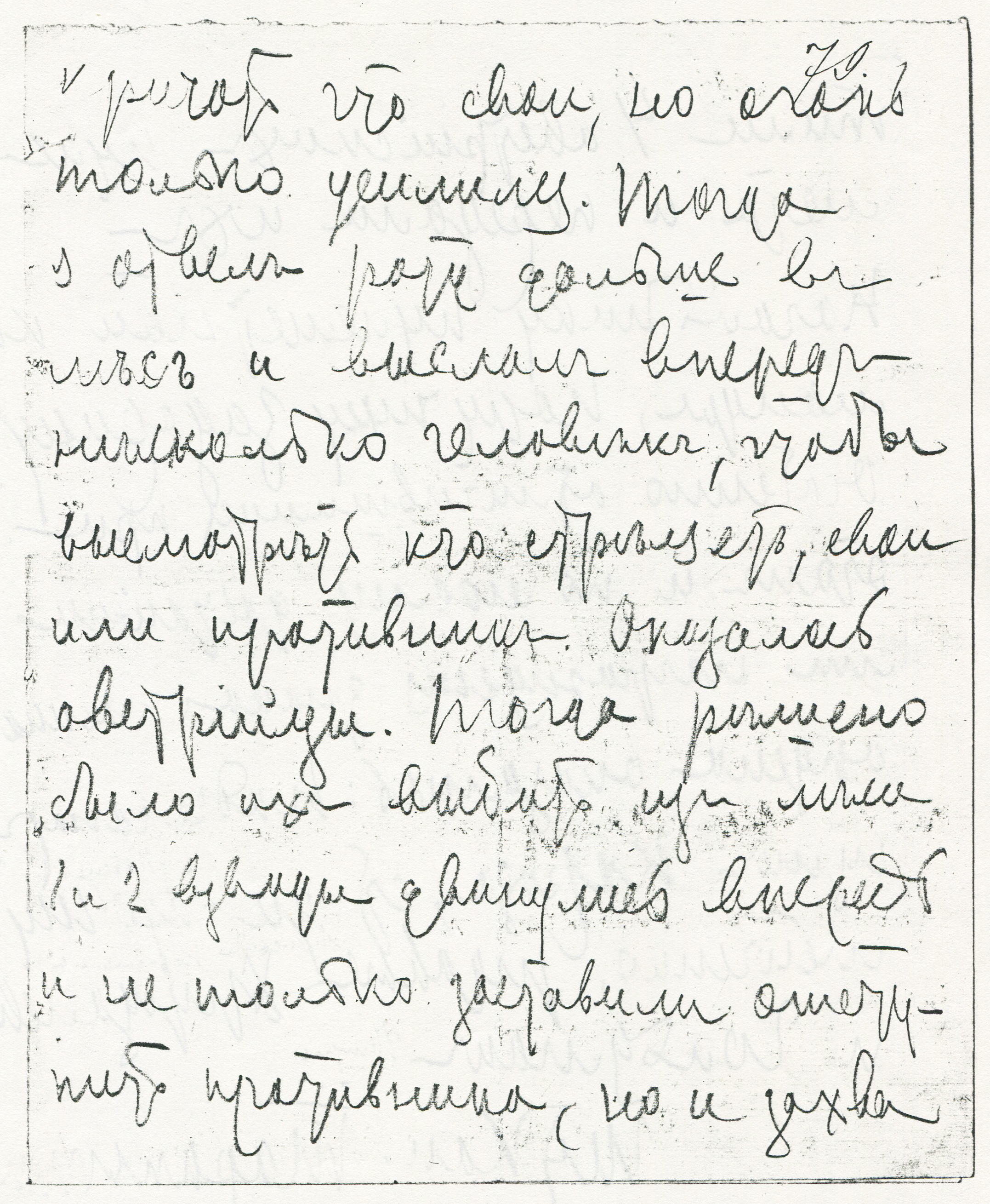 Доклад Тарапыгина П. И. о недавнем бое